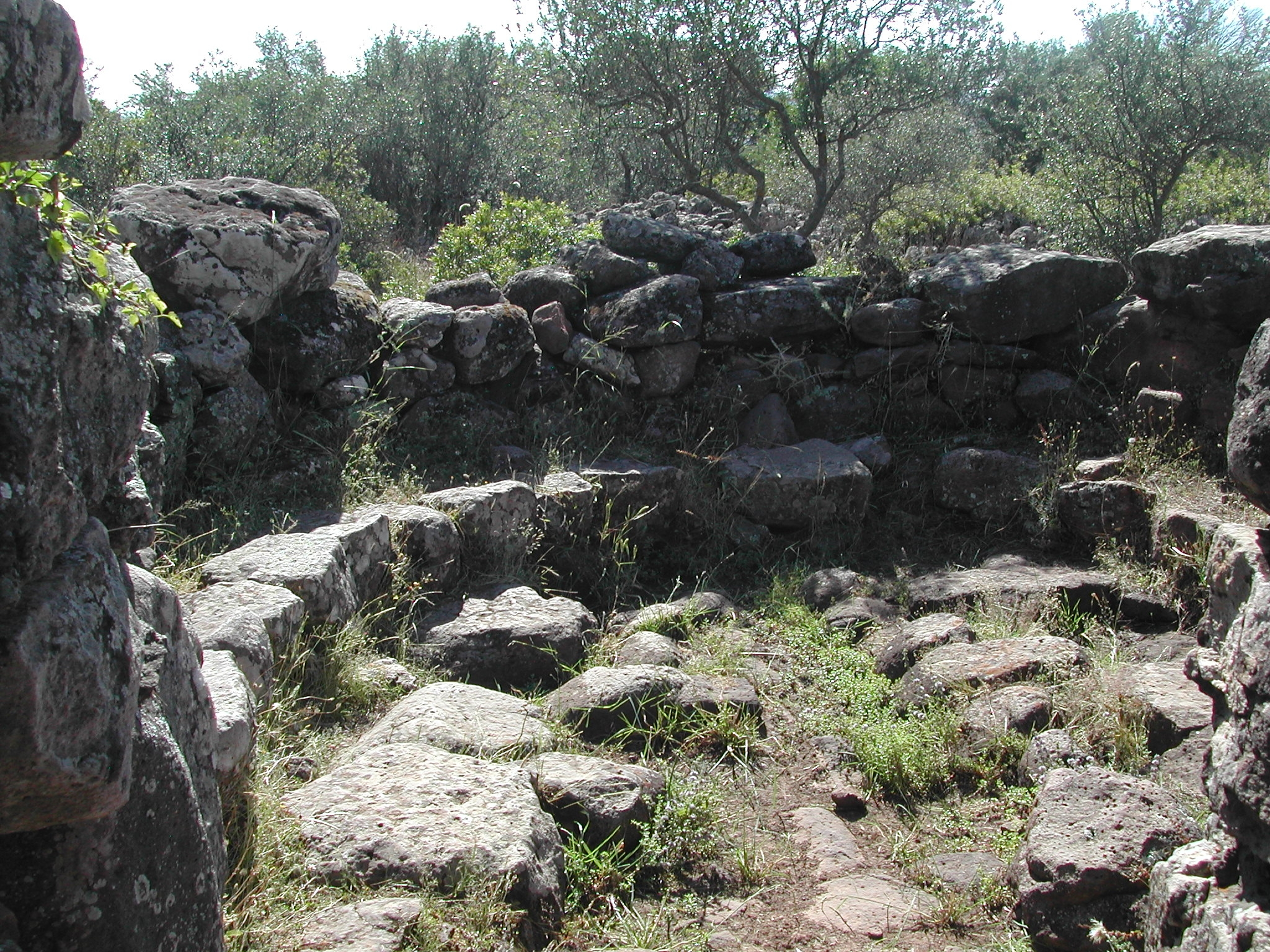 Villaggio archeologico di Serra Orrios (Sala del Consiglio)